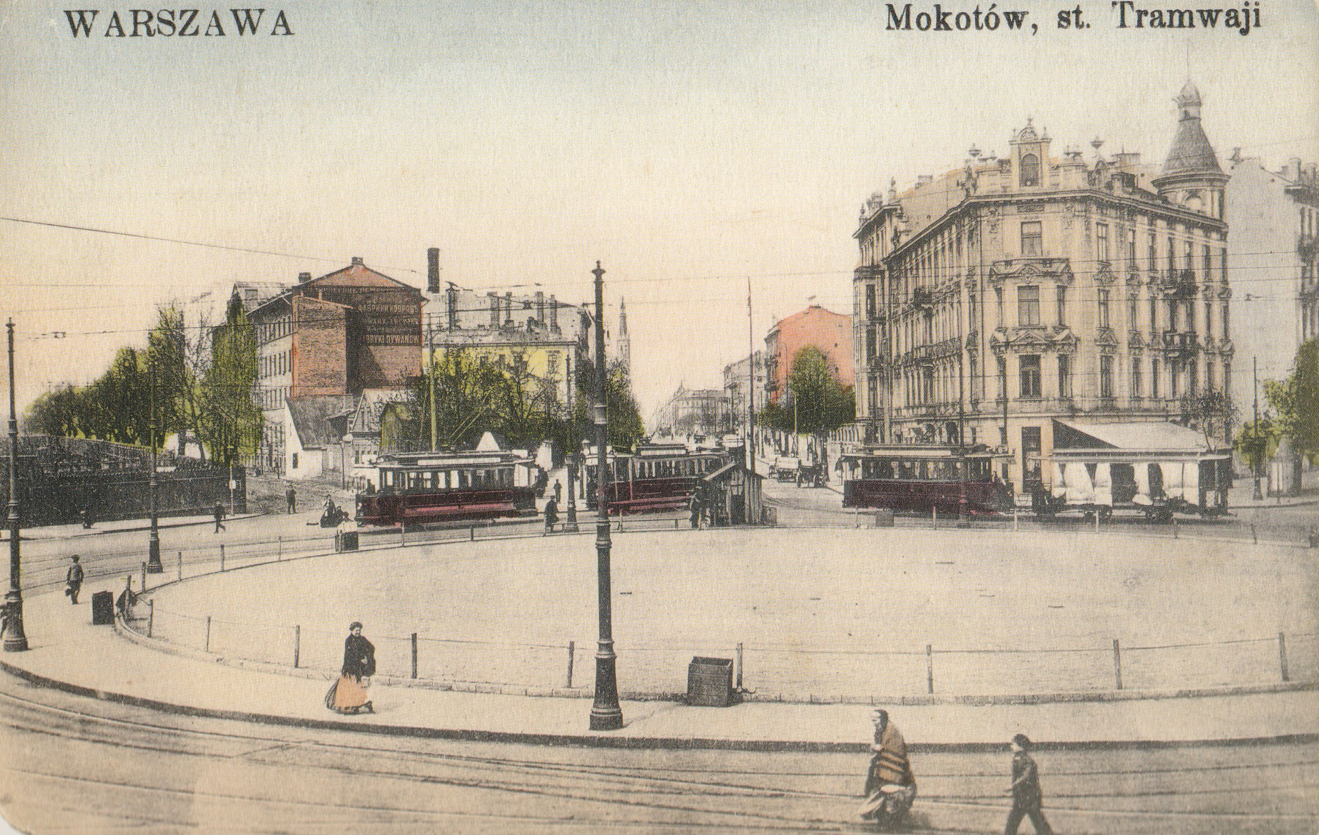 Rondo Keksholmskie (obecnie plac Unii Lubelskiej) w Warszawie